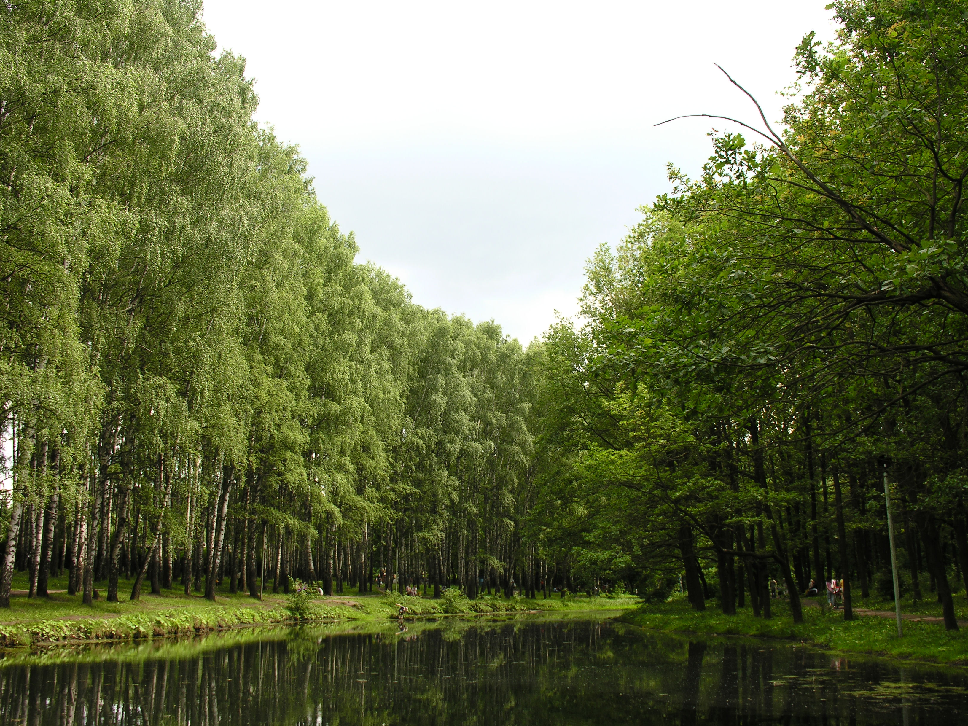 Первый искусственный водоём в каскаде детского парка в г. Новомосковск, Тульская область, Россия.